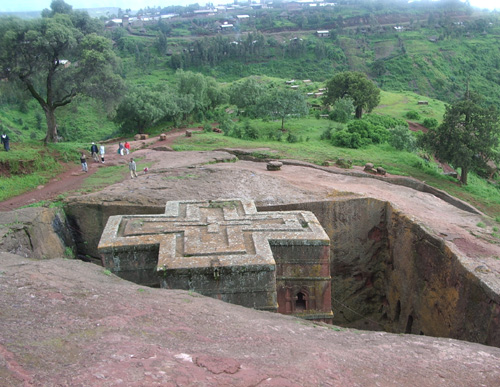 Sankt Georg kirken, den mindste men mest perfekte af Lalibelas klippekirker.